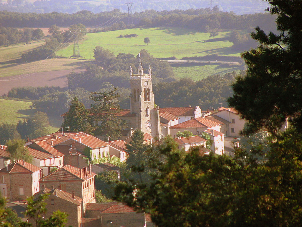 Photo du village de Rozier-en-Donzy, vu des bois de Mussy